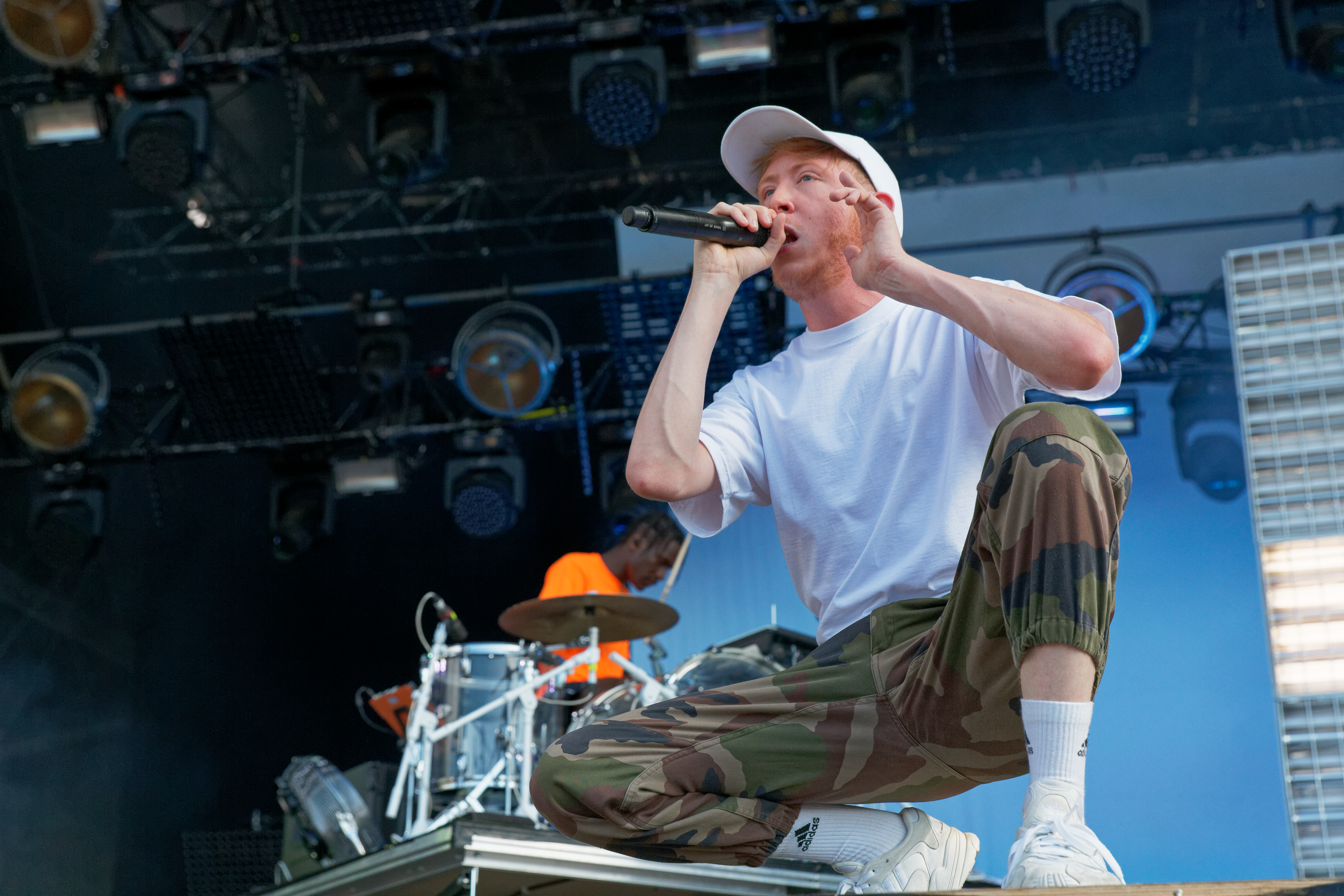 Eddy de Pretto en concert lors du festival des vieilles charrues 2018.